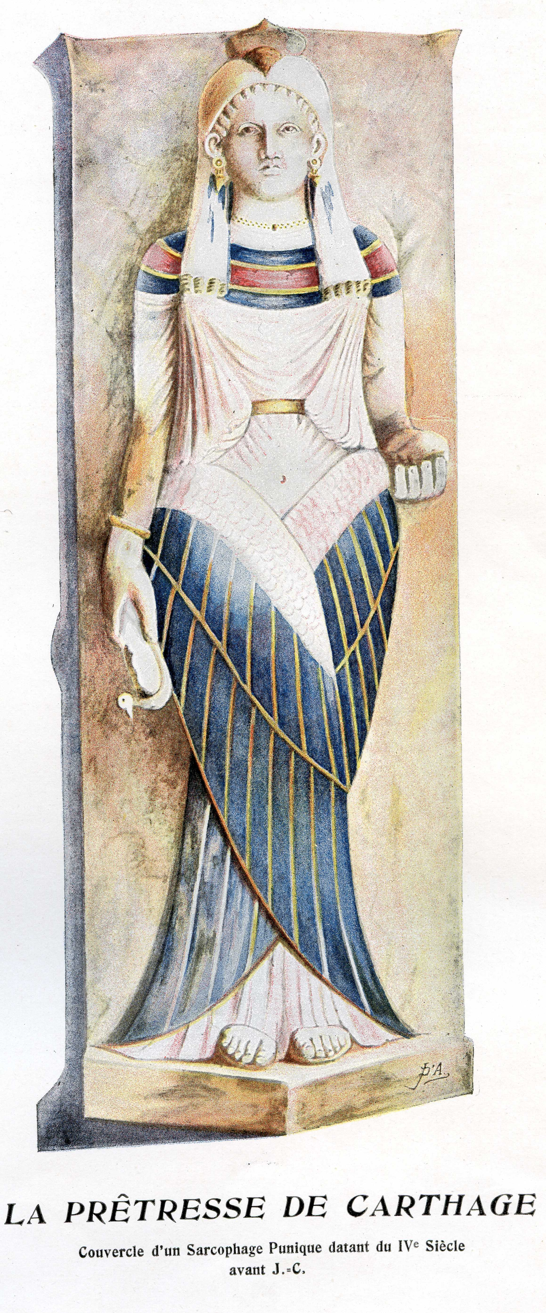 Sarcophage de la prêtresse, fouille Delattre